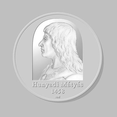 Hunyadi Mátyás emlékpénz, grafikai terv